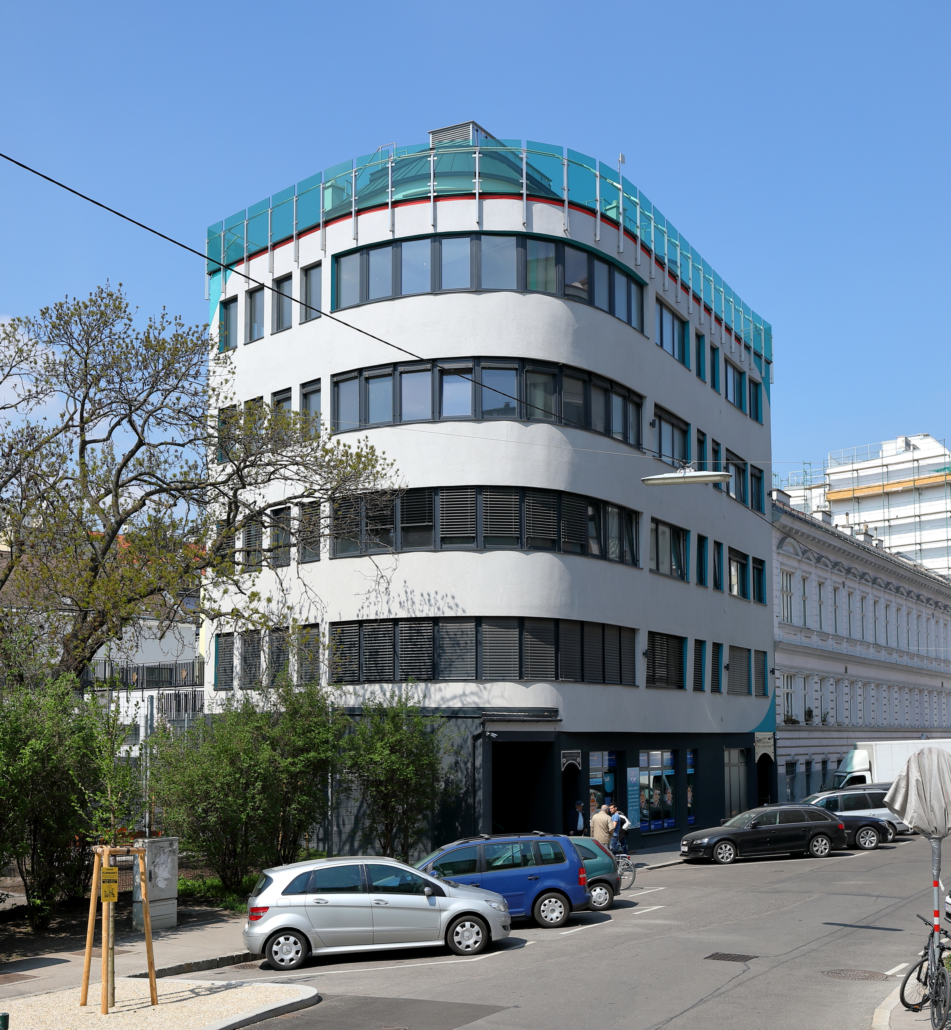 Das straßenseitige Gebäude des Kulturzentrums des türkisch-islamischen Kulturvereins ATIB Union in der Dammstraße im 20. Wiener Bezirk Brigittenau.Ursprünglich ein Fabriksareal wurde es 1996 von ATIB aufgekauft und anfangs der 2010er Jahre umgebaut sowie das straßenseitige Gebäude auf 5 Geschosse aufgestockt. Der darin untergebrachte Kindergarten erregte im Frühjahr 2018 aufsehen, weil die Buben mit Tarnuniform und Mädchen mit Kopftüchern "Kriegsspiele" betrieben.